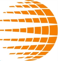 Logo circular color naranja